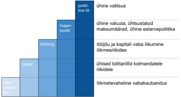 Majandusliku integratsiooni tasemed. Vabakaubanduspiirkond, tolliliit, ühisturg, majandusliit, poliitiline liit